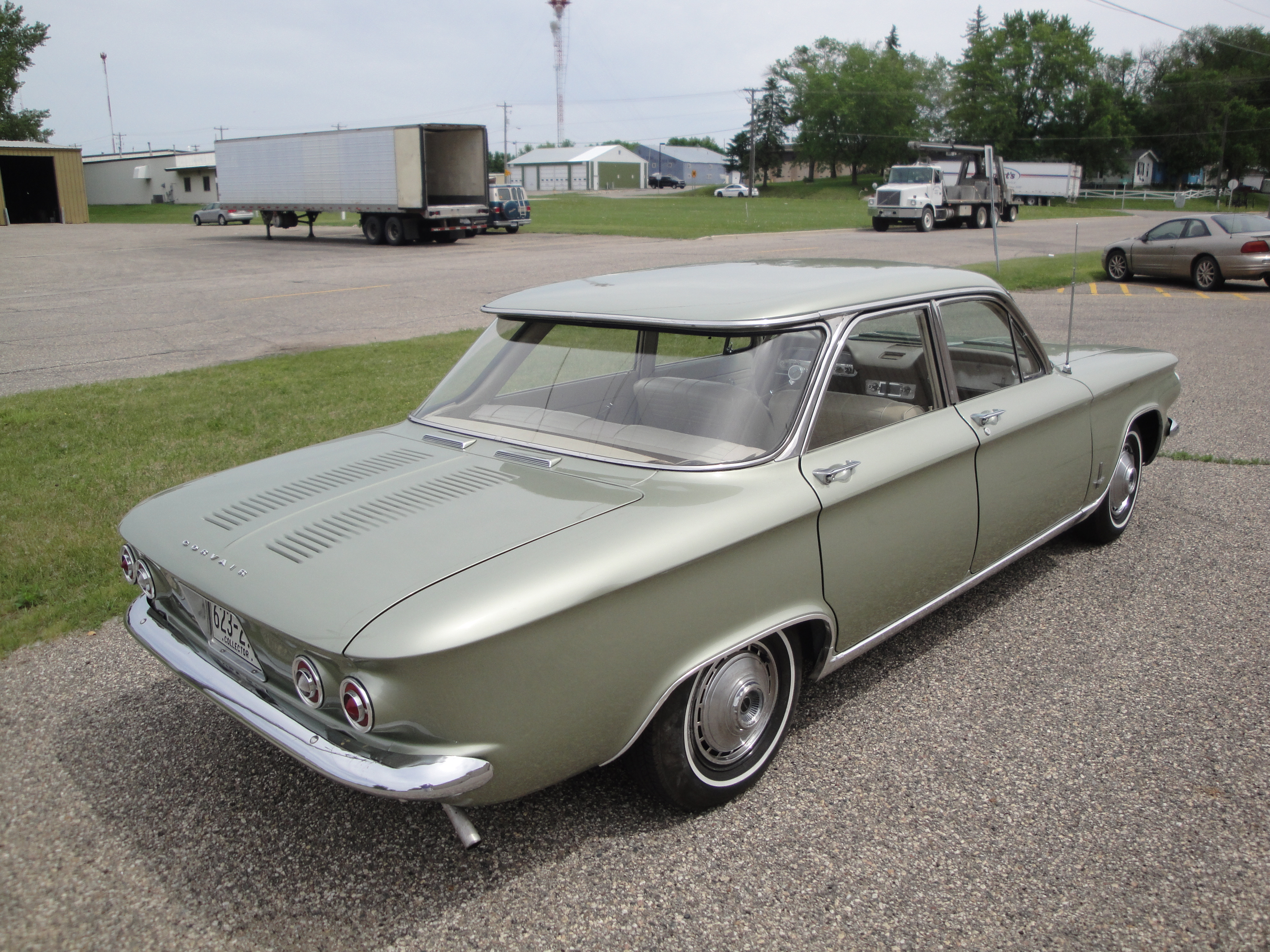 64 Chevrolet Corvair Monza